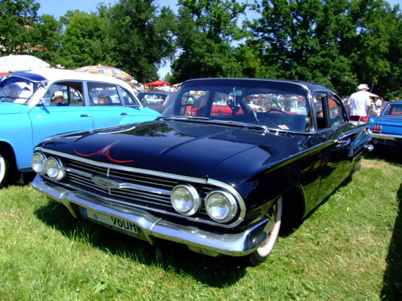 Chevrolet Impala 1960